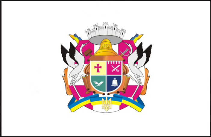 Прапор Новограда-Волинського